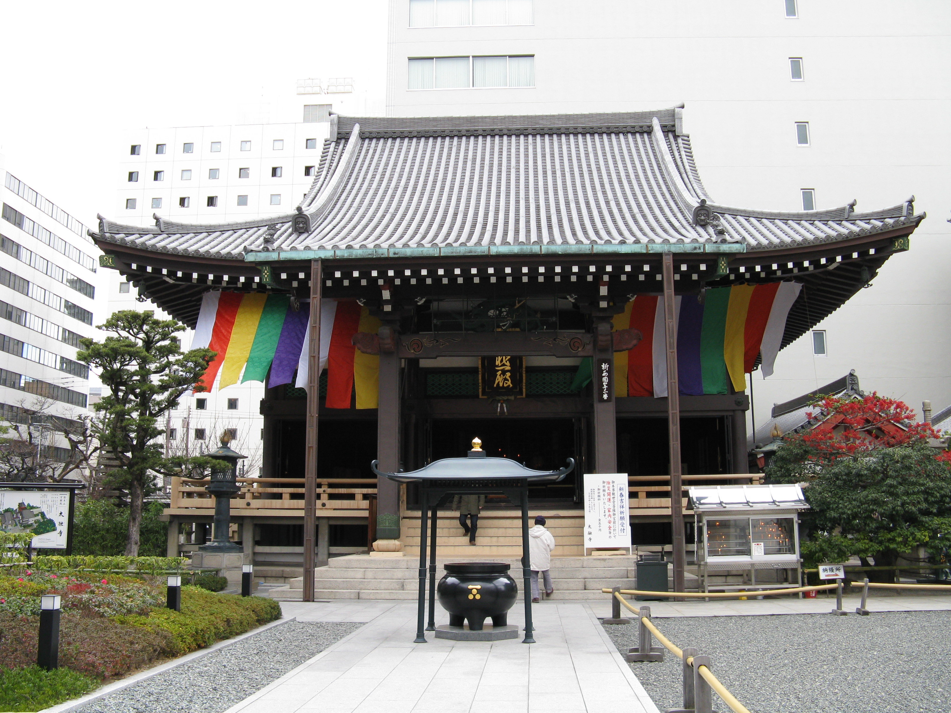 太融寺 本堂